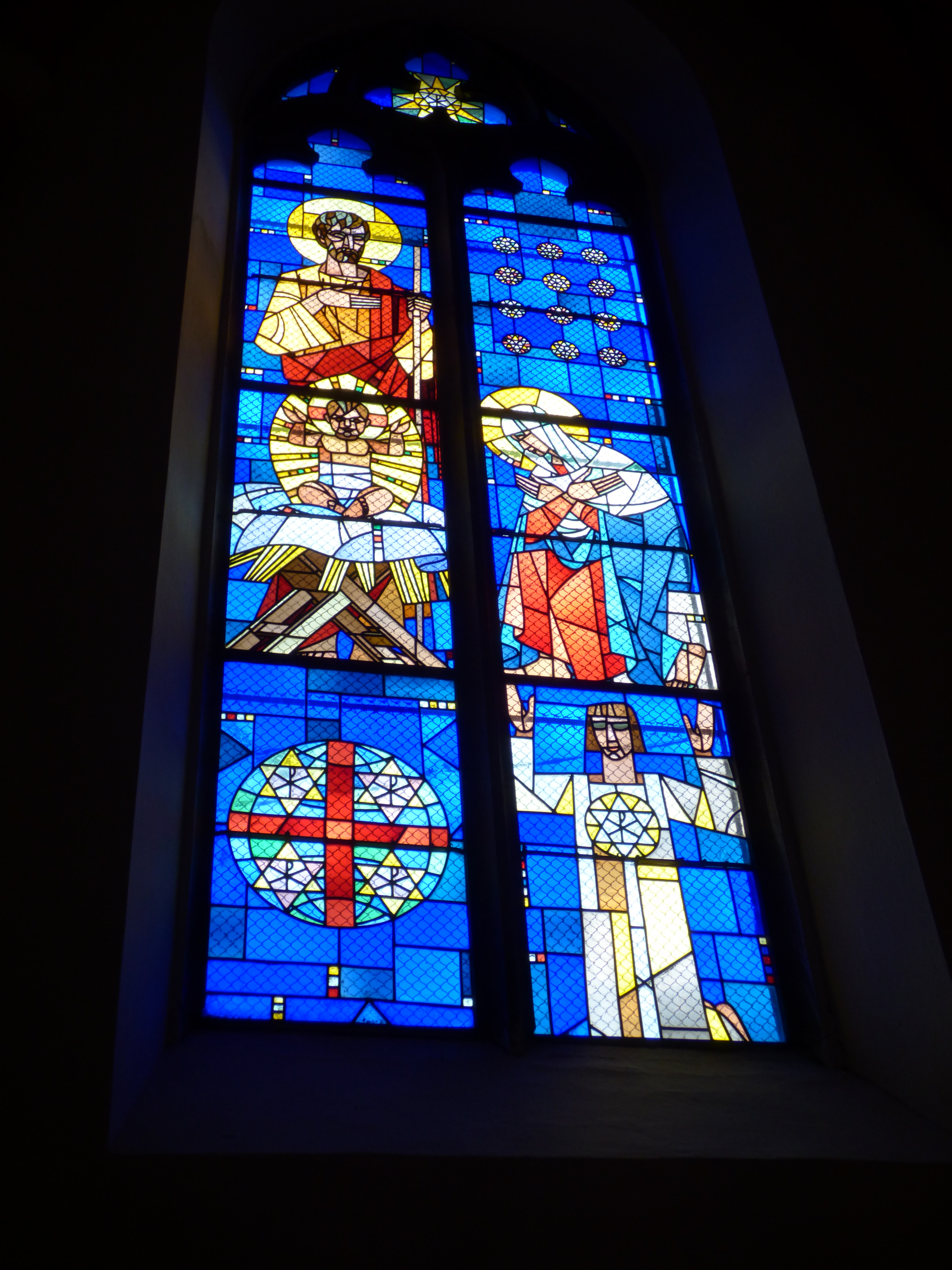 Vitráž okna